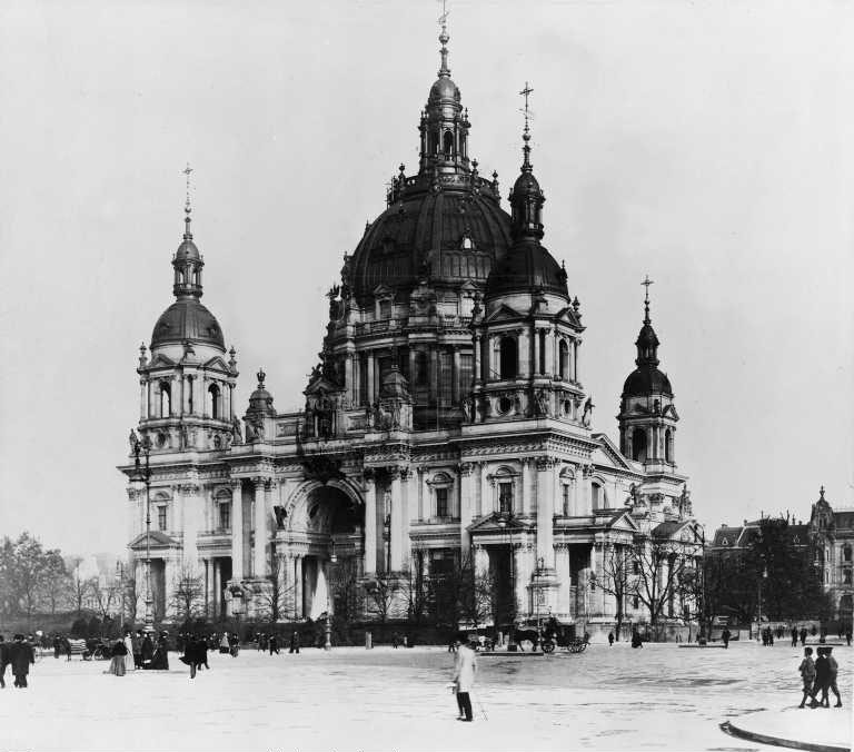 Berliner Dom um 1905 Bildnummer: 40005356 Titel: Blick von der Schloßfreiheit zur Domkirche Nachbearbeitung: BPK Logo/Wasserzeichen entfernt